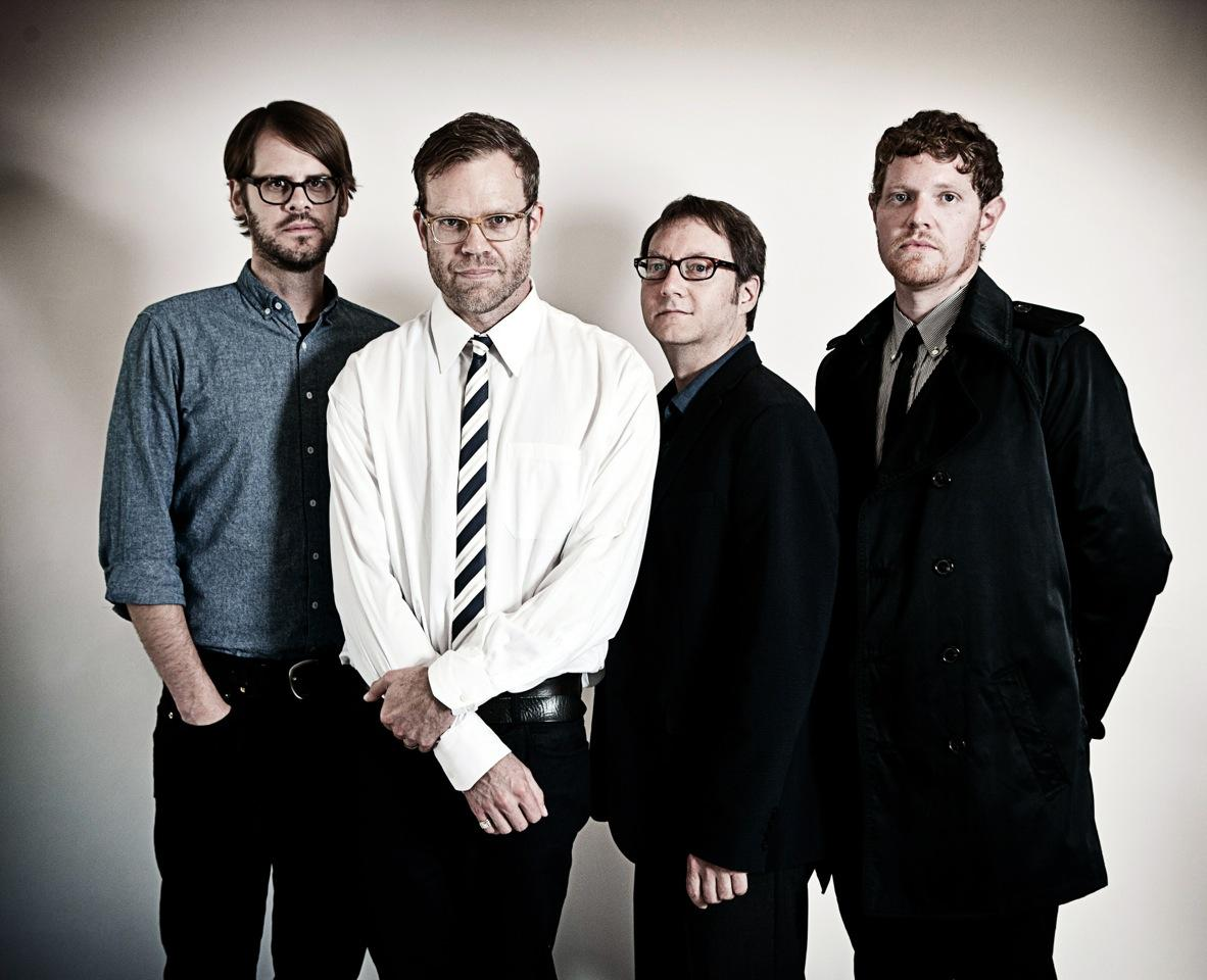 Spain, Herbst 2012